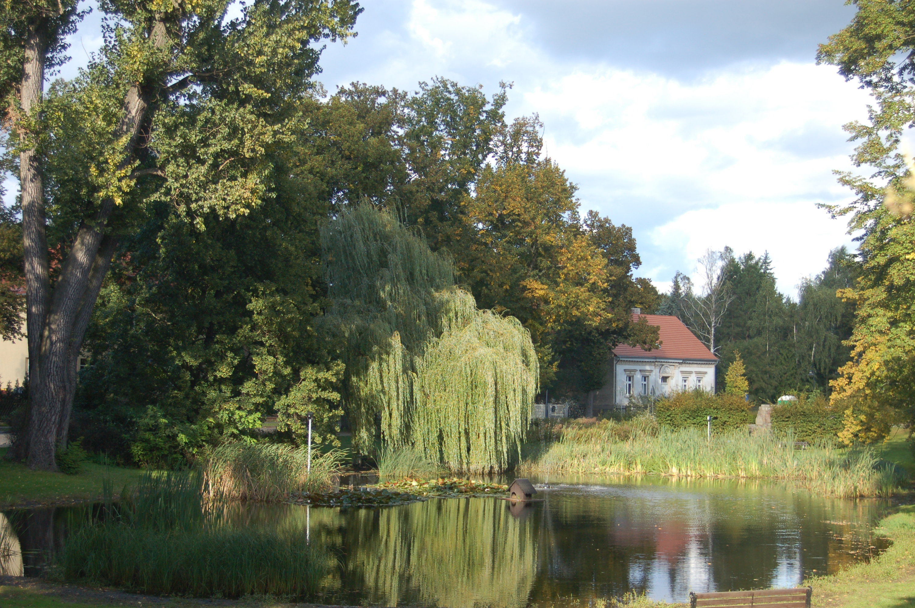 Dorfteich.